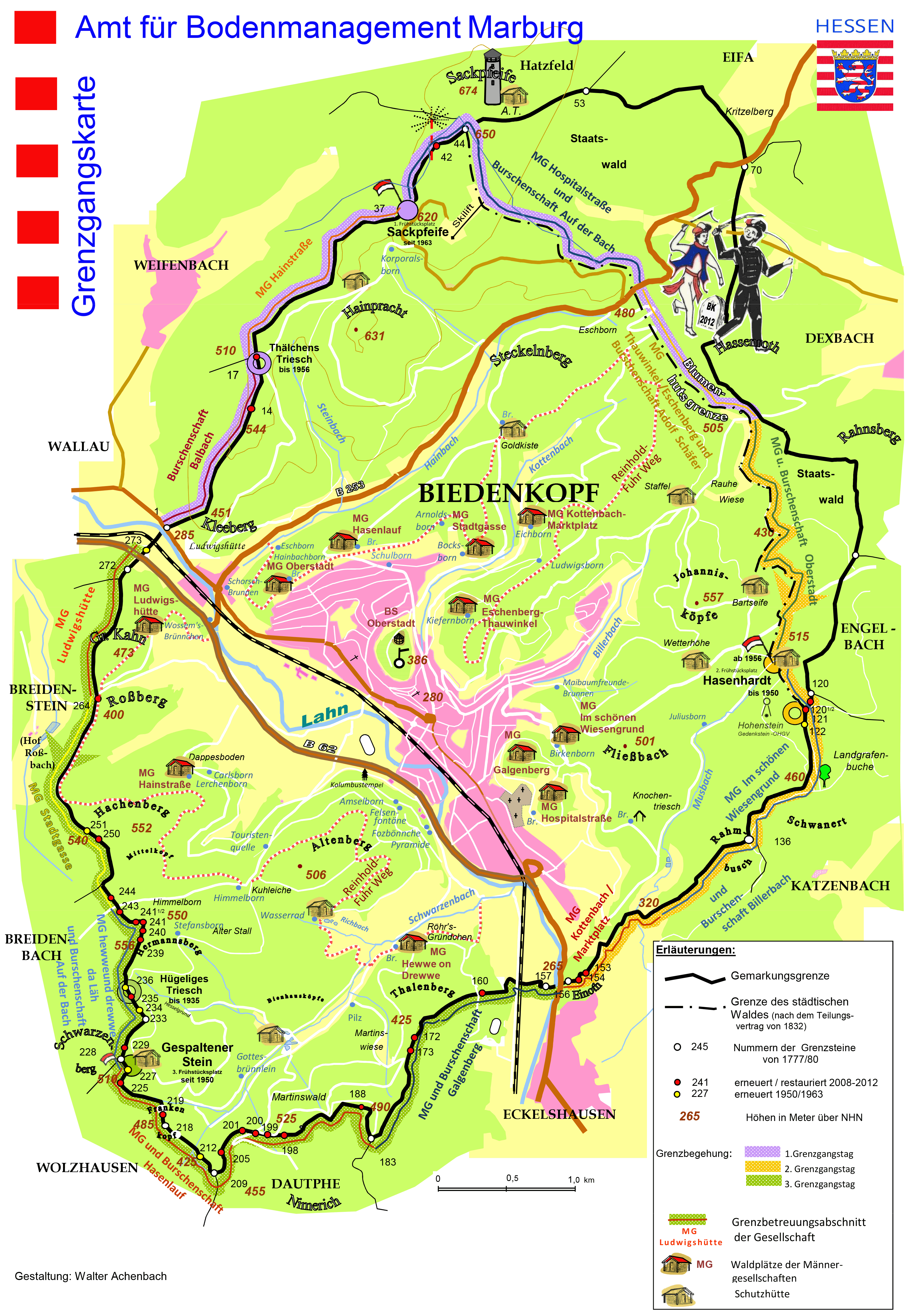 Grenzgangskarte der Stadt Biedenkopf. Die Karte zeigt den Verlauf der Gemarkungsgrenzen mit Lage und Nummer der Grenzsteine und weitere Details im Kontext des Grenzgang Biedenkopf.